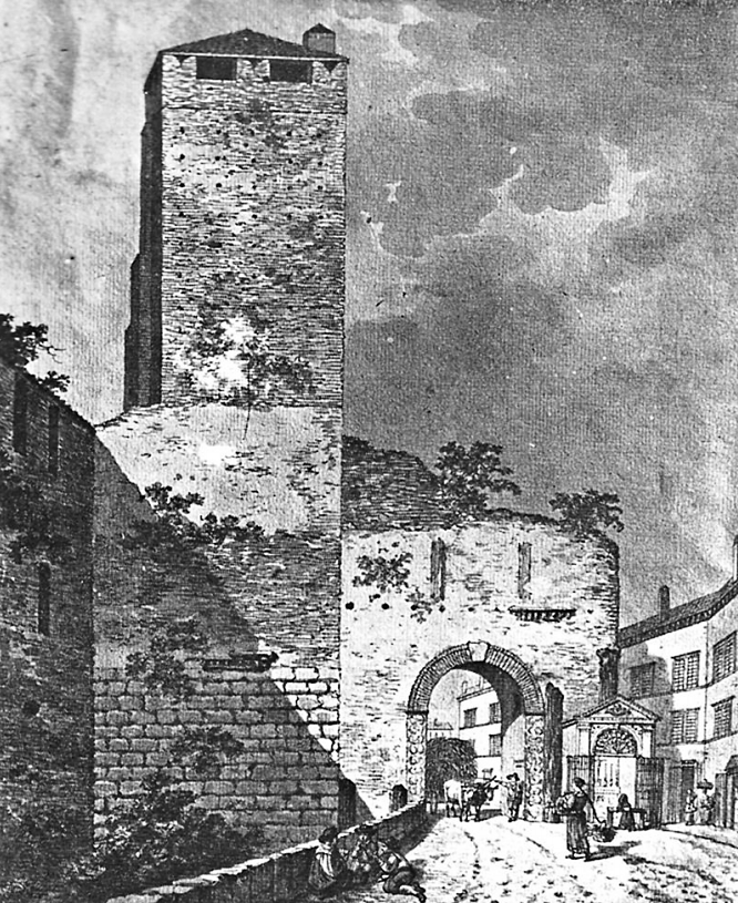 Arco dei Gavi, Disegno del XVIII secolo, Autore ignoto. Disegno dell'arco di quando si trovava ancora nella sua posizione originaria, prima della demolizione del 1805.